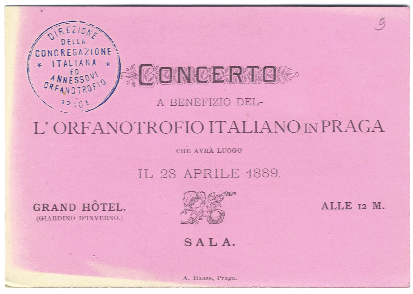 Invito al concerto al Teatro Rudolfinum in beneficenza dei bambini